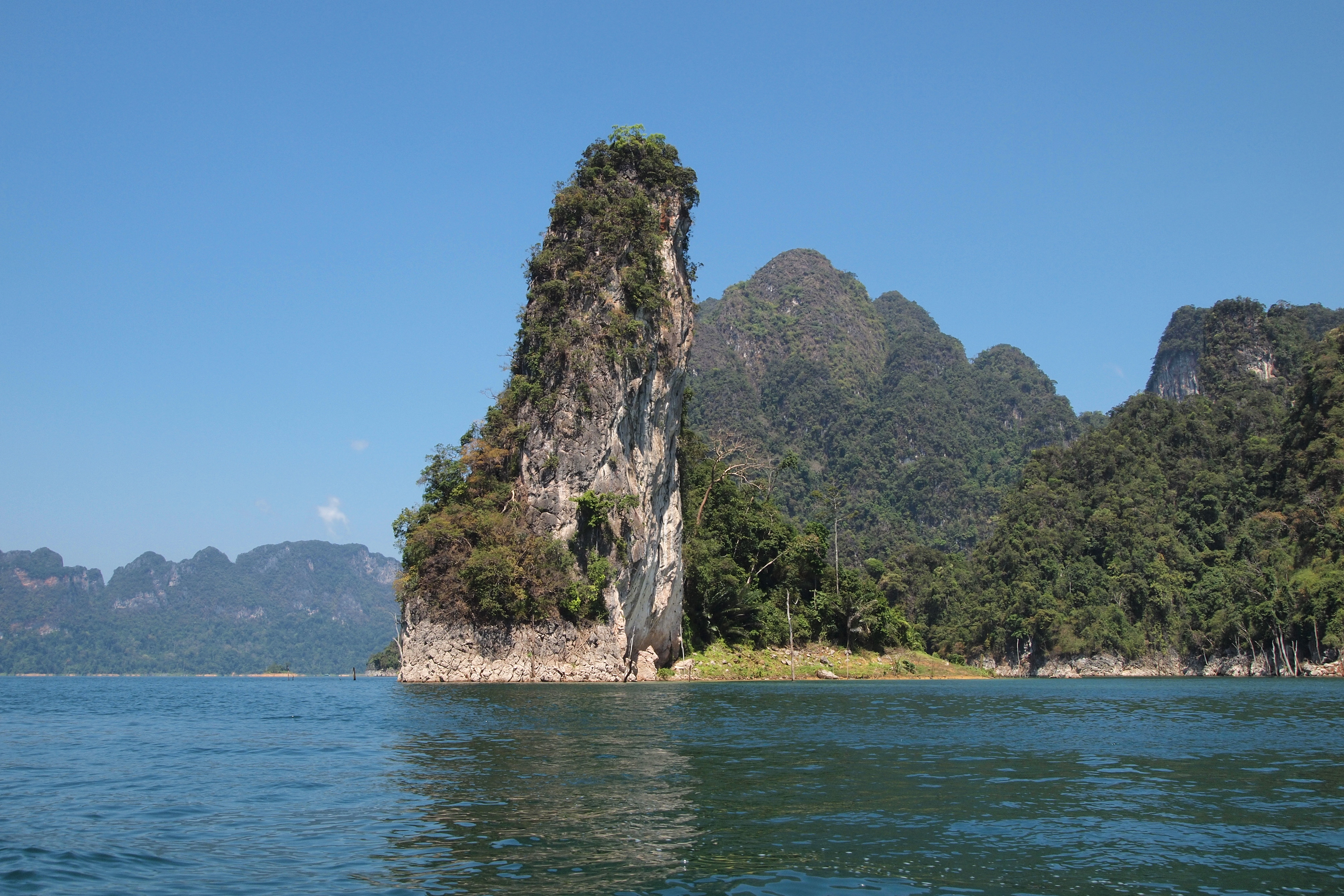 อุทยานแห่งชาติเขาสก